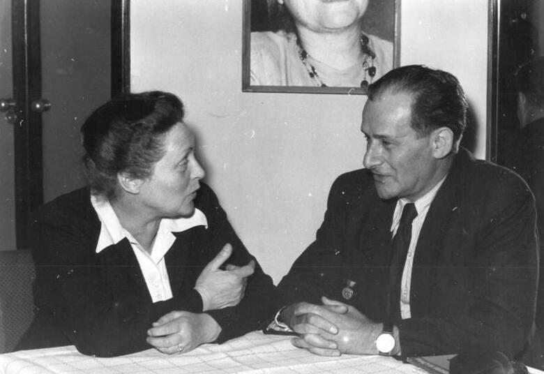 Zentralbild-Gielow 23.5.52 III.Deutscher Schriftstellerkongreß vom 22.-25. Mai 1952 in Berlin. UBz: Friedrich Wolf im Gespräch mit Annemarie Koffler, der Präsidialrätin des Kulturbundes in Greifswald.